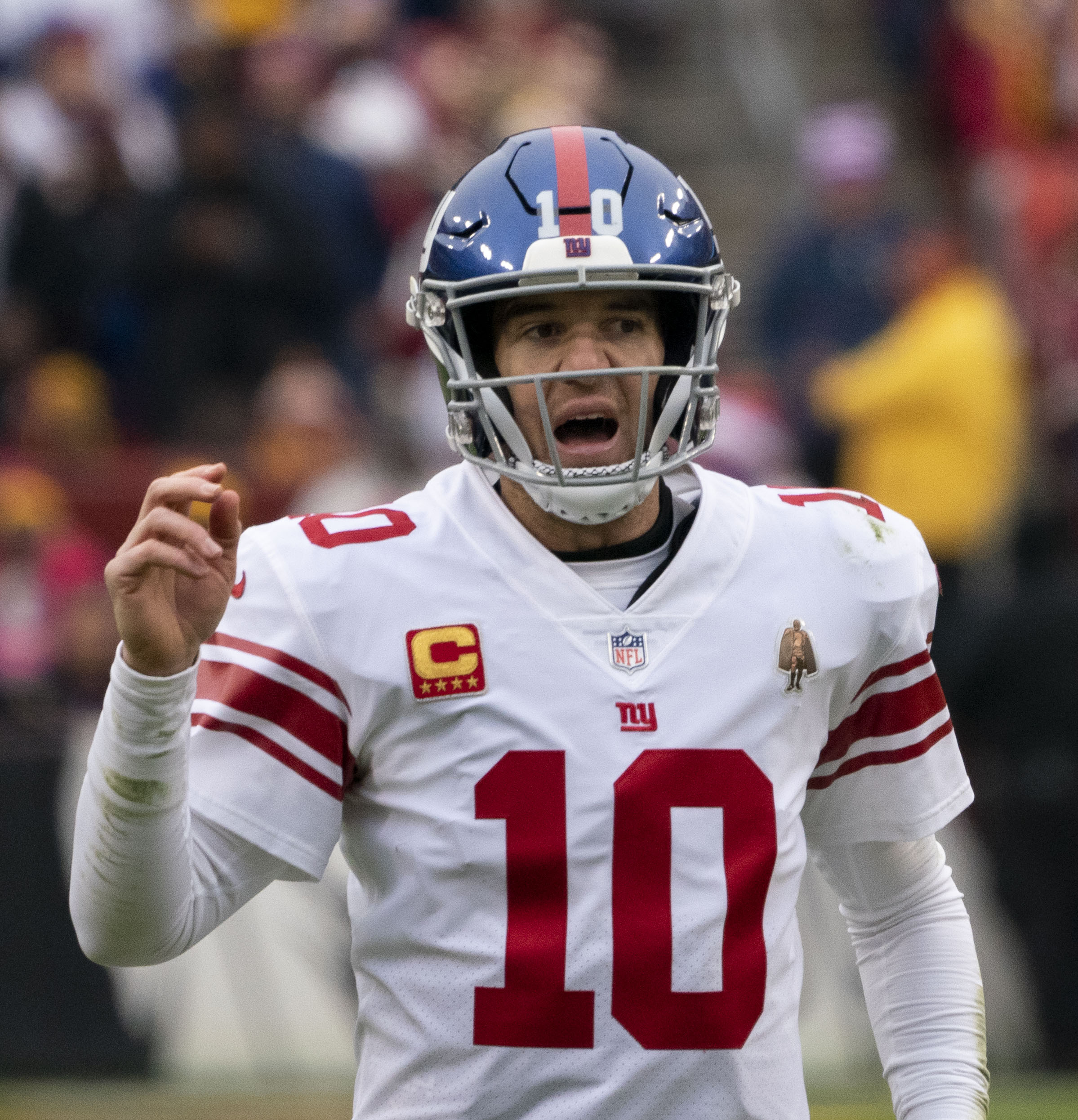 Giants at Redskins 12/09/18